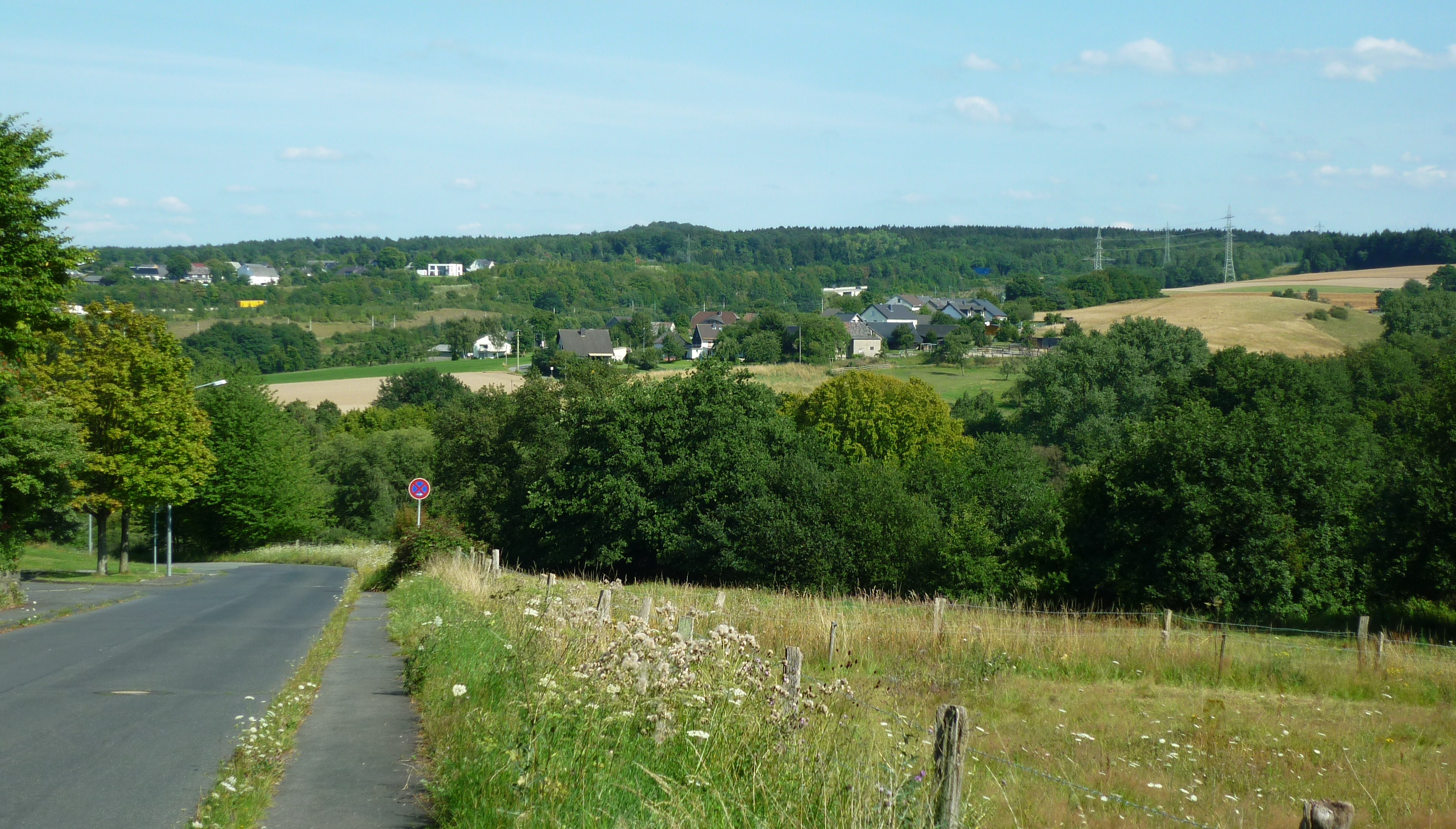 Retscheid von der Burgwiesenstraße aus gesehen – im Hintergrund links: Orscheid, Aegidienberg